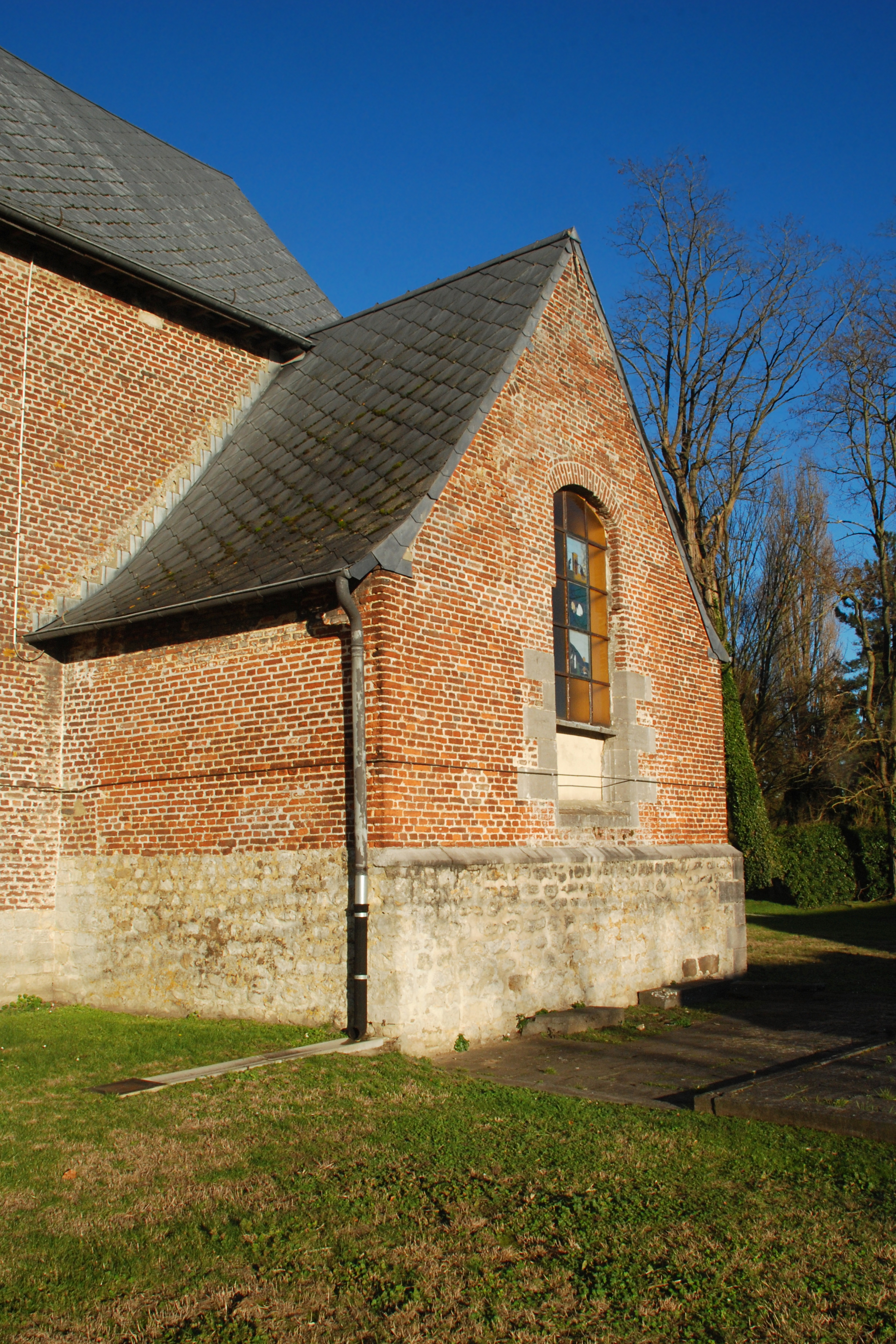 Belgique - Brabant wallon - Genappe - Glabais - Église Saint-Pierre